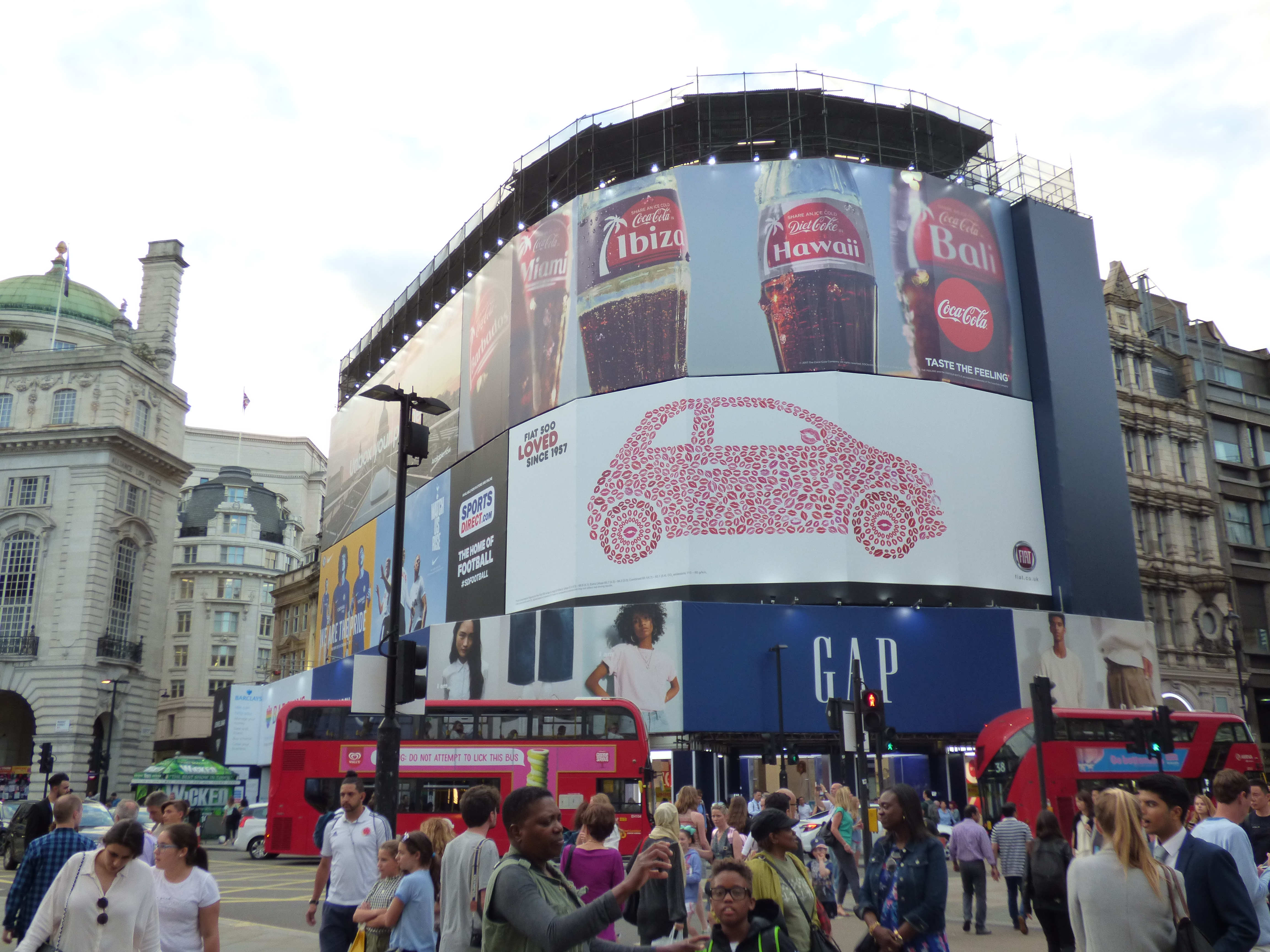 Piccadilly Circus - 07. 2017